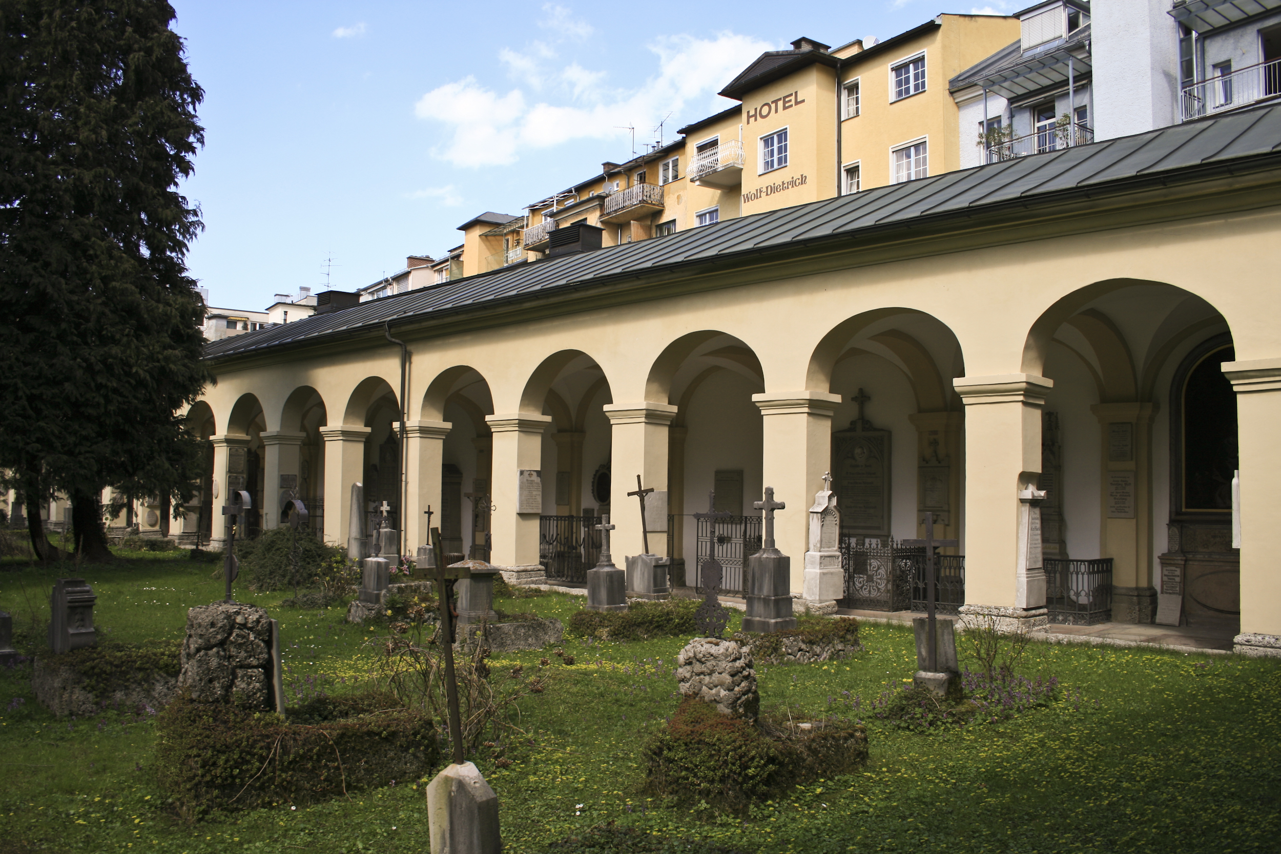 Sebastiansfriedhof in Salzburg mit Friedhofsarkaden